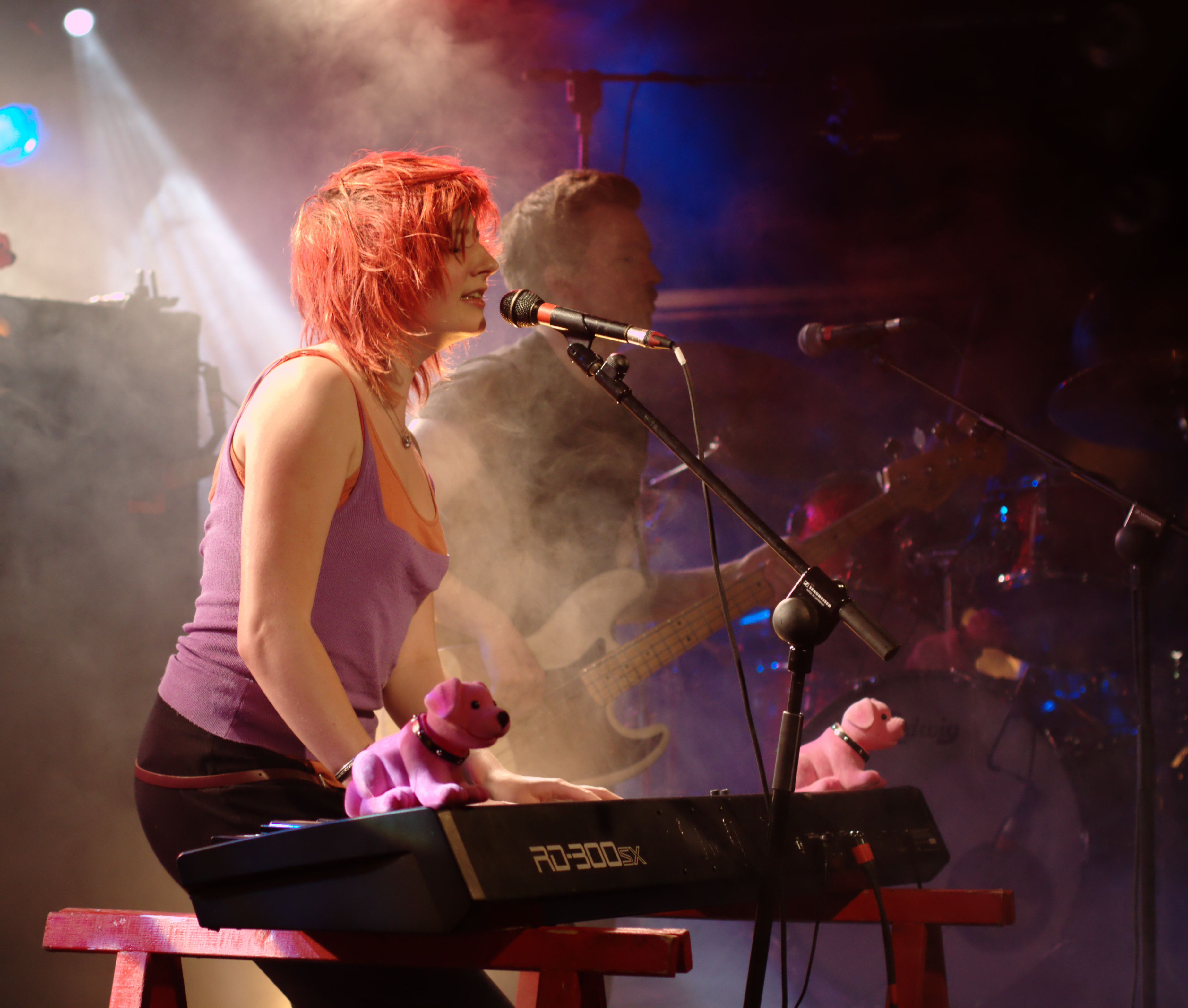 Roosbeef